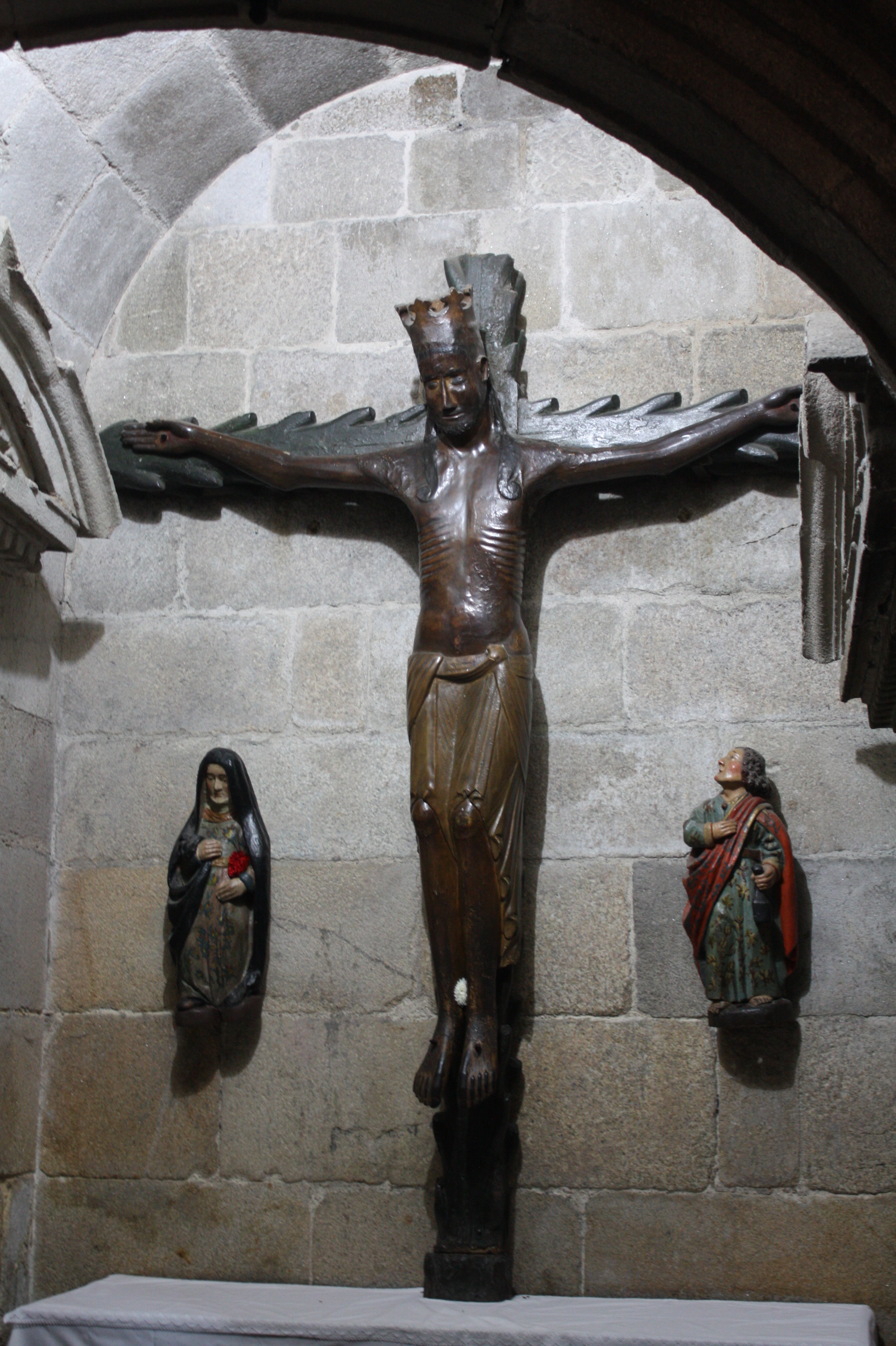 Cristo dos Desamparados, do século XII, na Catedral de Ourense.